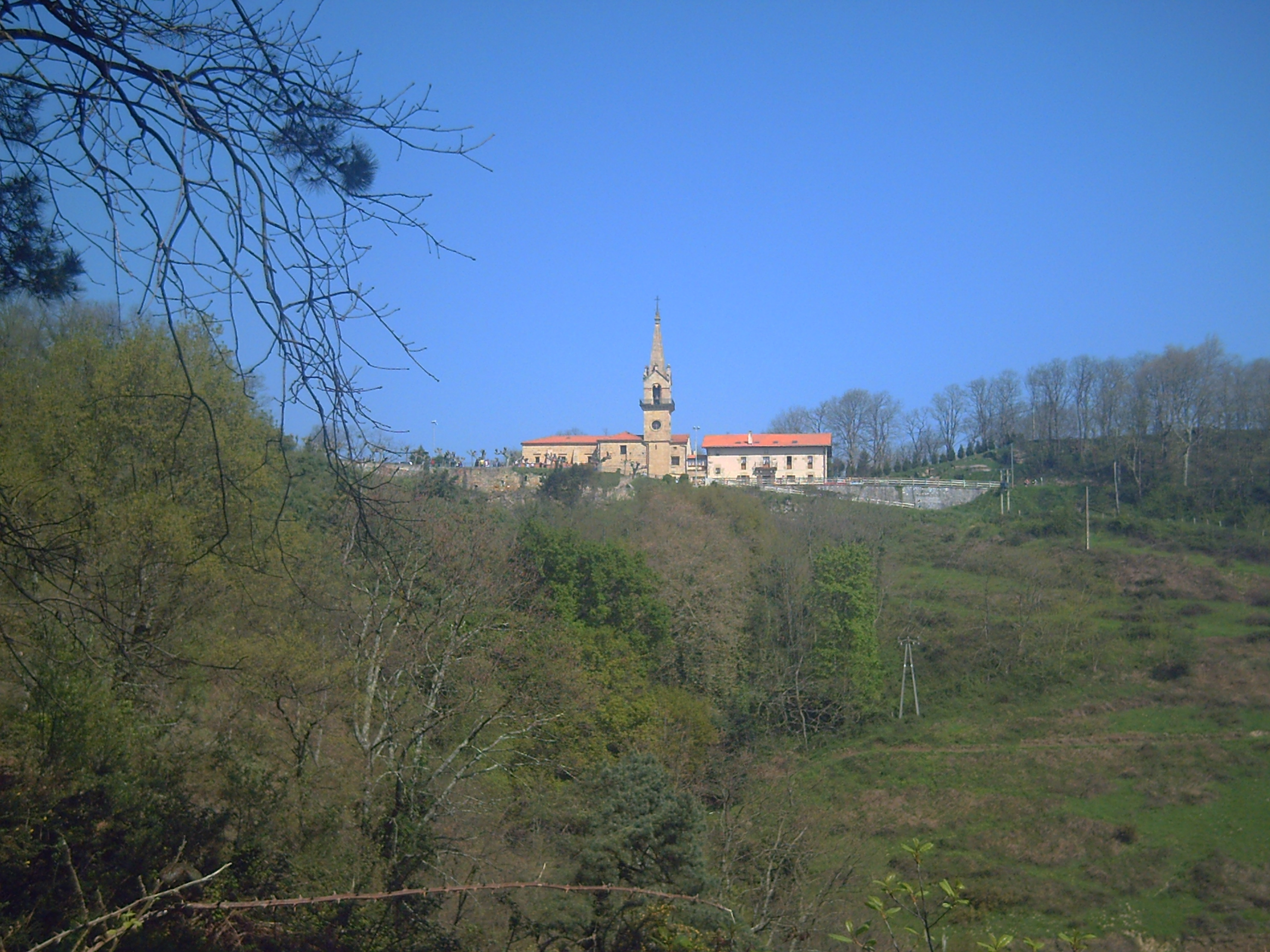 Guadalupe baseliza Hondarribia Guadalupe Hermitage of Hondarribia